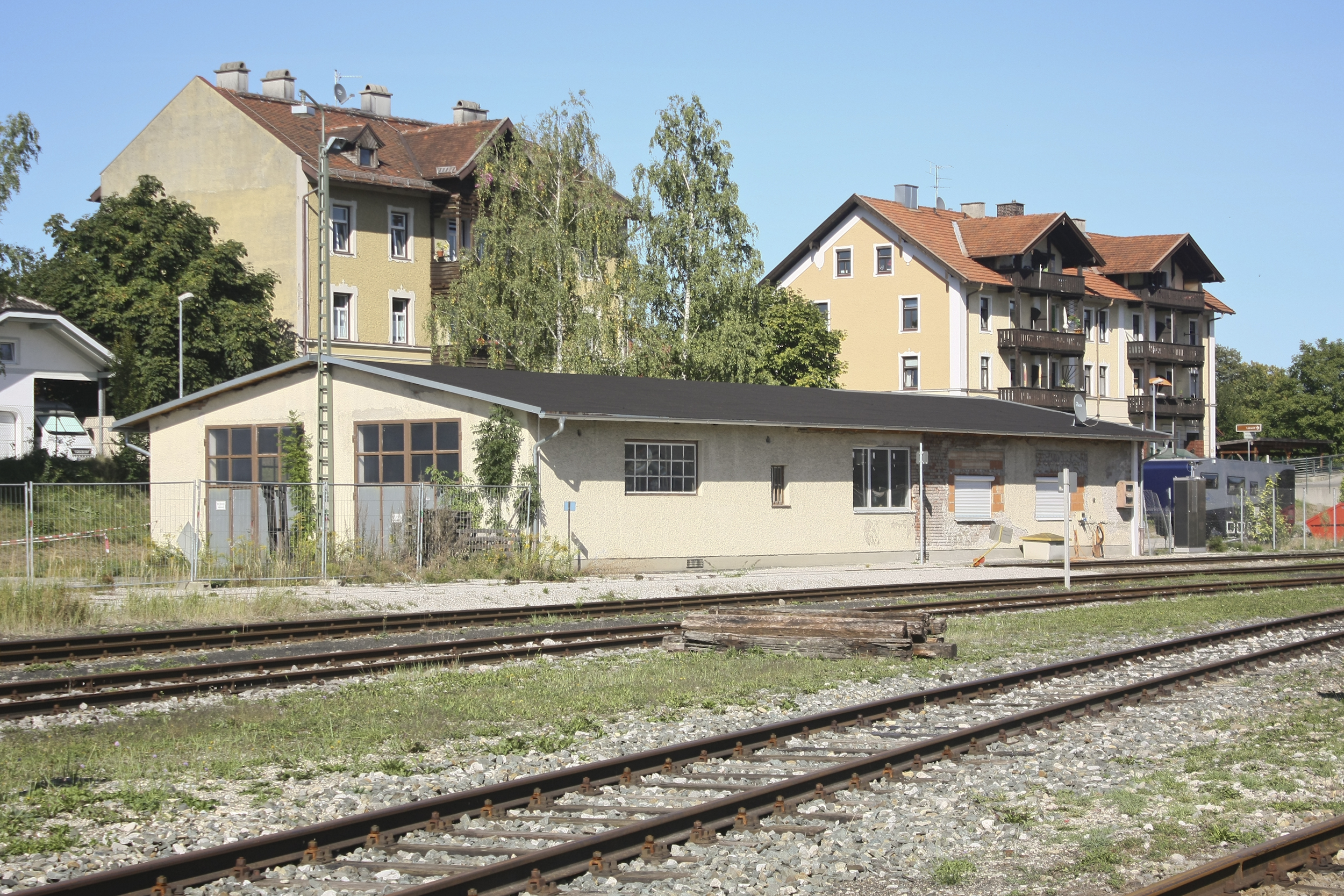 Bahnbetriebswerk, Betriebs- und Reparaturwerkstätte westlich des Bahnhofs mit Anschluß zur Hauptstrecke Rosenheim-Salzburg, im wesentlichen 1902-07 errichtet (Inbetriebnahme 1905) und 1924-26 im Zusammenhang mit der Elektrifizierung des Zugverkehrs erweitert, bestehend aus: Wagenrichthalle, Rechteckhalle mit parallelen Gleisständen, Kernbau 1902-05, in gleicher Bauweise gemäß urspr. Konzeption 1925/26 nach Norden und Osten erweitert; angeschlossen ehem. Radsatz-Werkstätte (Dreherei) mit Magazingebäude, 1902-05; Verwaltungs- und Übernachtungsgebäude, freistehender dreigeschossiger Satteldachbau, 1902-05; Halbrundschuppen für Triebfahrzeuge mit 20 Radialgleisen, 1902-05, mit Gelenk-Drehscheibe von 1923 (bez.) und Oberleitungsspinne; Ellok-Werkstatt, sog. Groß- und Kleinmontierhalle, in Eisenbetonkonstruktion, und Verbindungsbau zum Rundschuppen, 1924-26; mit zugehörigen Gleis- und Wartungsanlagen. This is a photograph of an architectural monument.